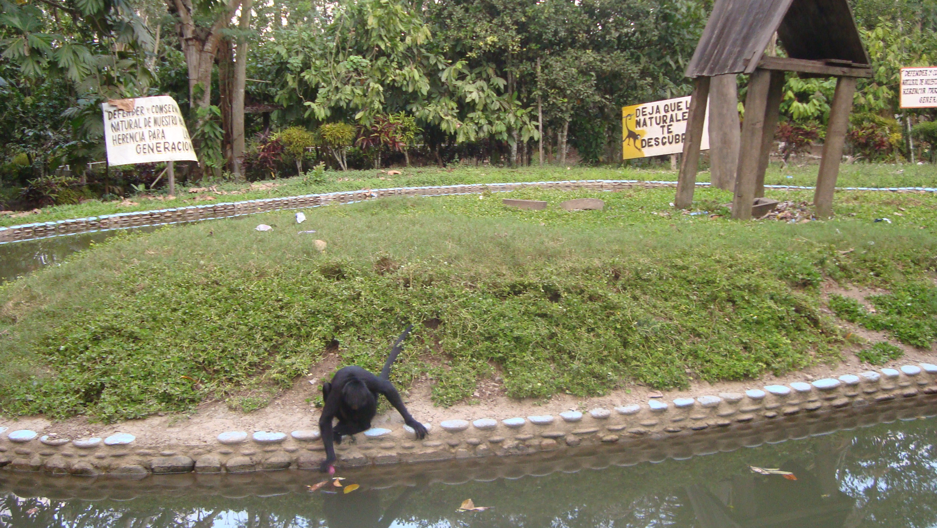 isla de monos en el zoologico de sivia